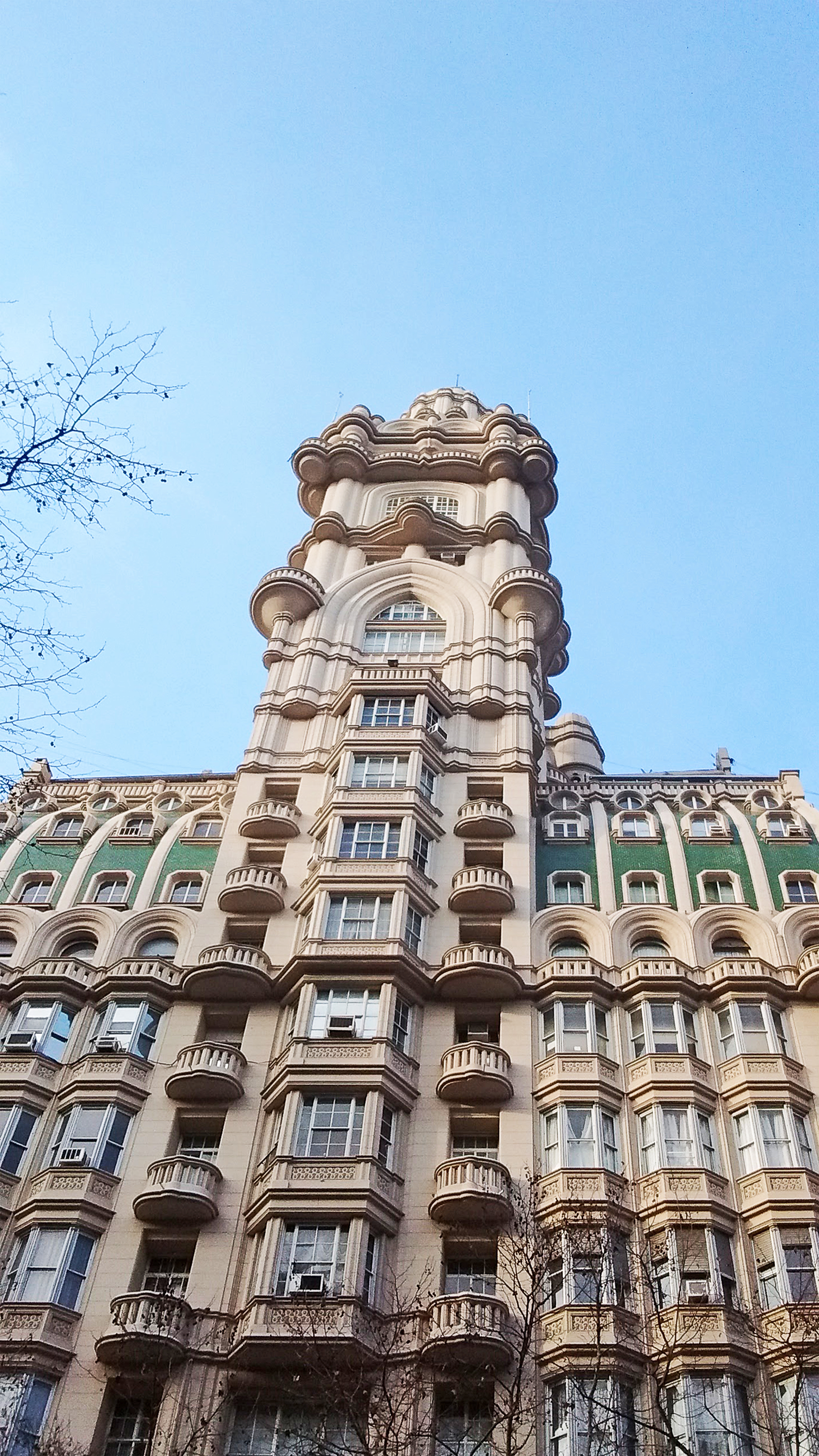 Edificio: Palacio Barolo